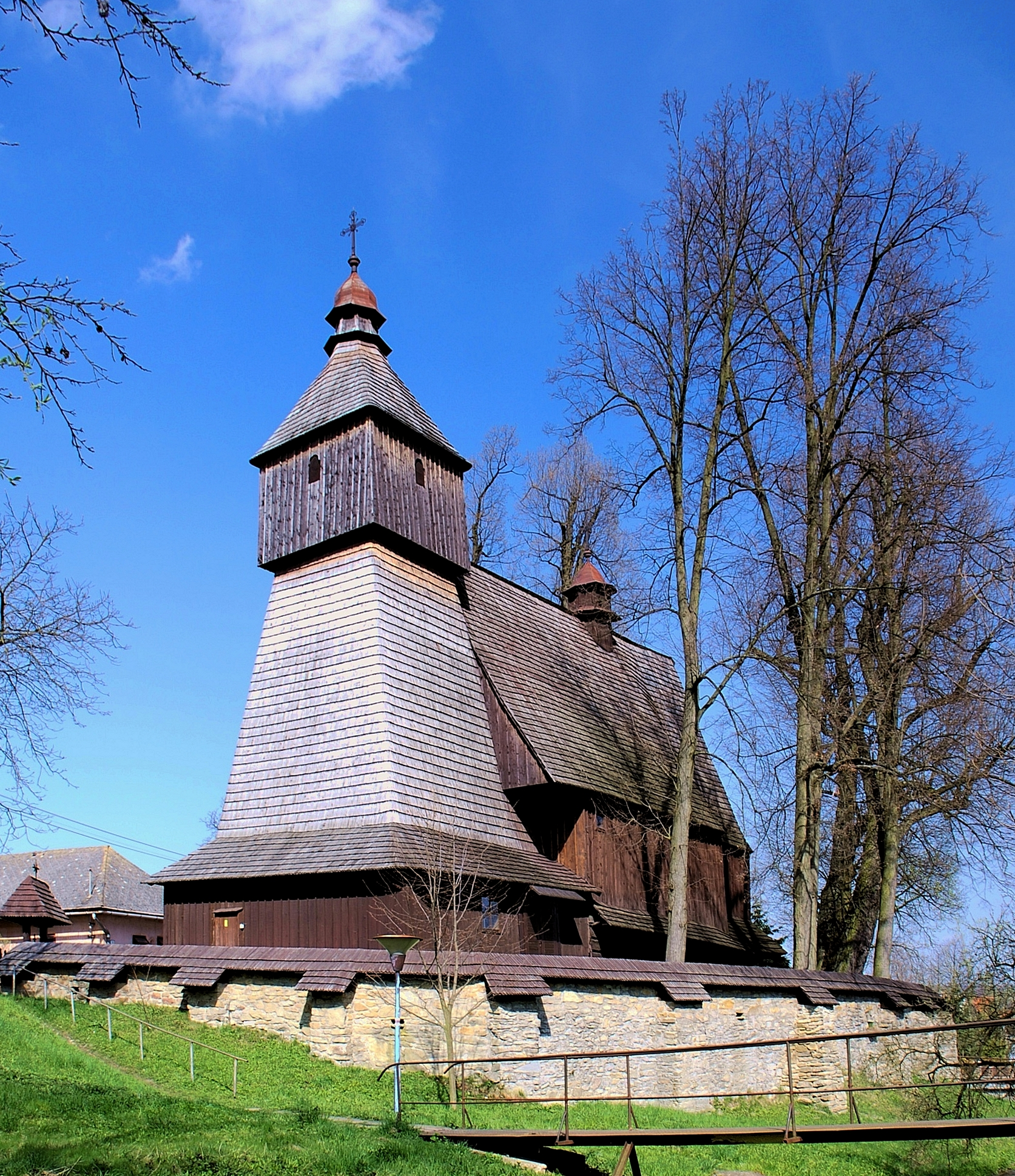 wieś Hervartov